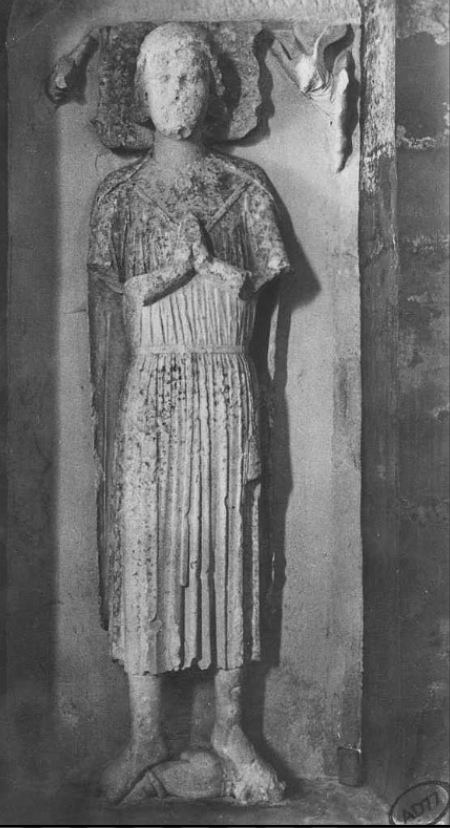 Statue gisant probablement dans la chapelle de Fontaines-les-nonnes